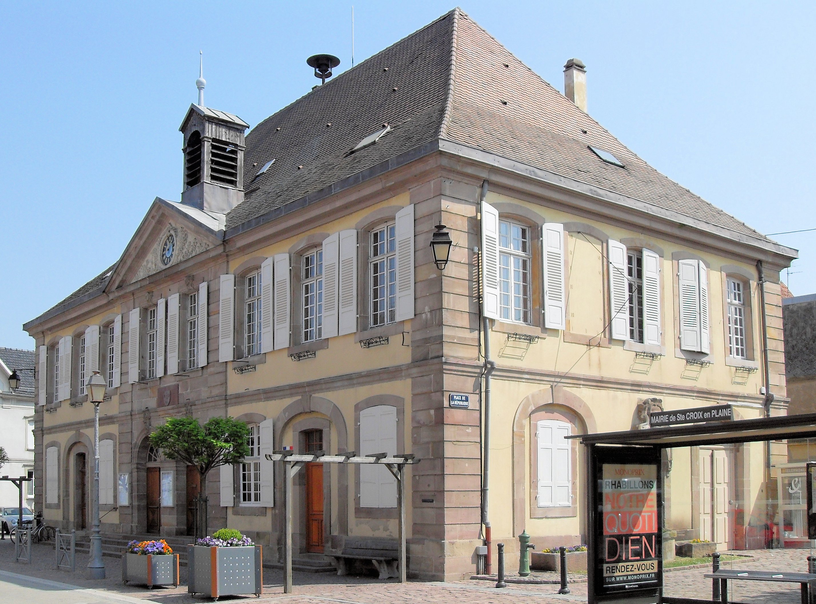 La mairie de Saint-Croix-en-Plaine